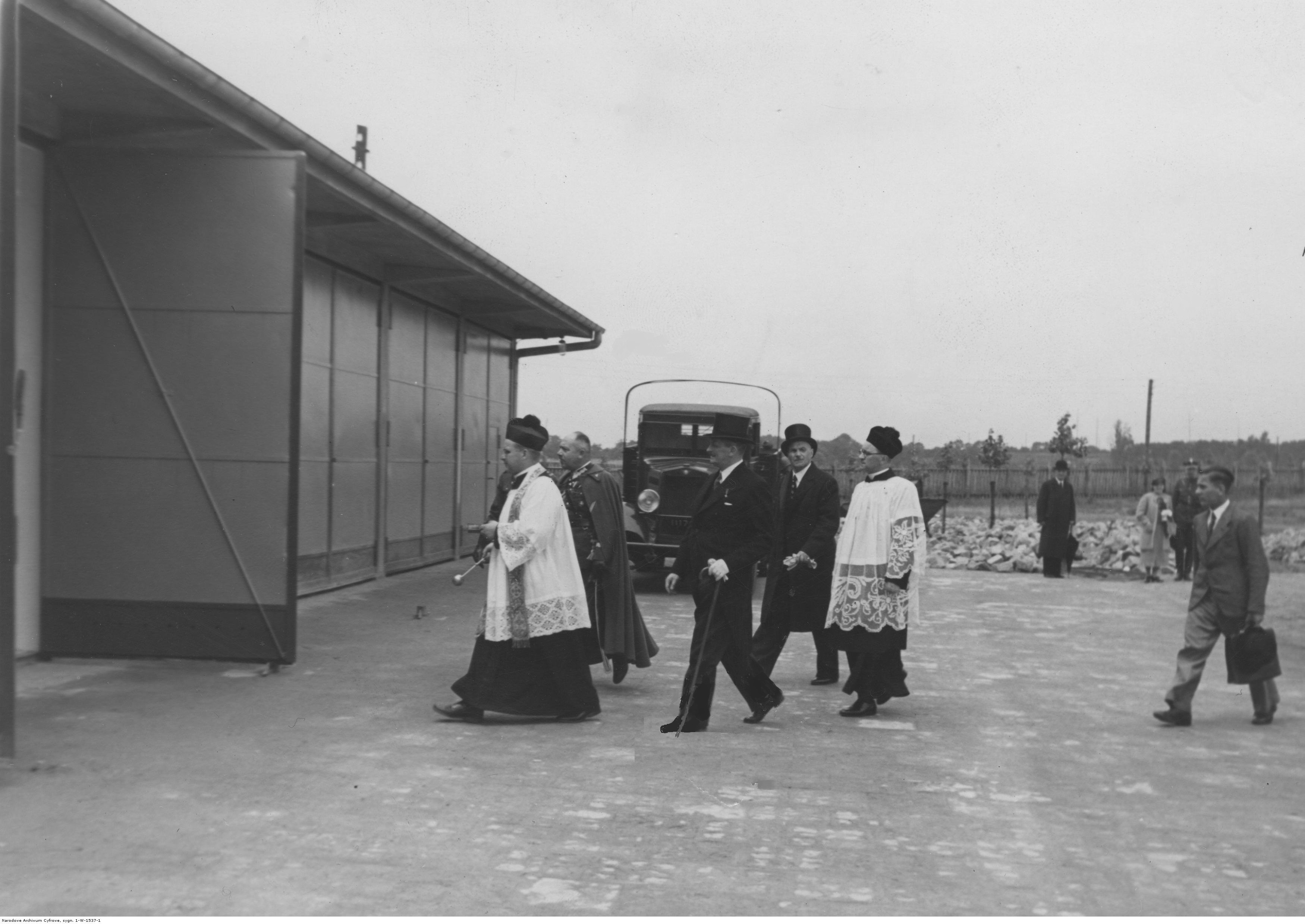 Święto 7 Dywizjonu Artylerii Przeciwlotniczej w Poznaniu; lipiec 1938. Ksiądz kapelan Franciszek Dymarski oraz wojewoda poznański Artur Maruszewski (z laską) w drodze do garaży dywizjonu. Koncern Ilustrowany Kurier Codzienny - Archiwum Ilustracji. Sygnatura: 1-W-1537-1